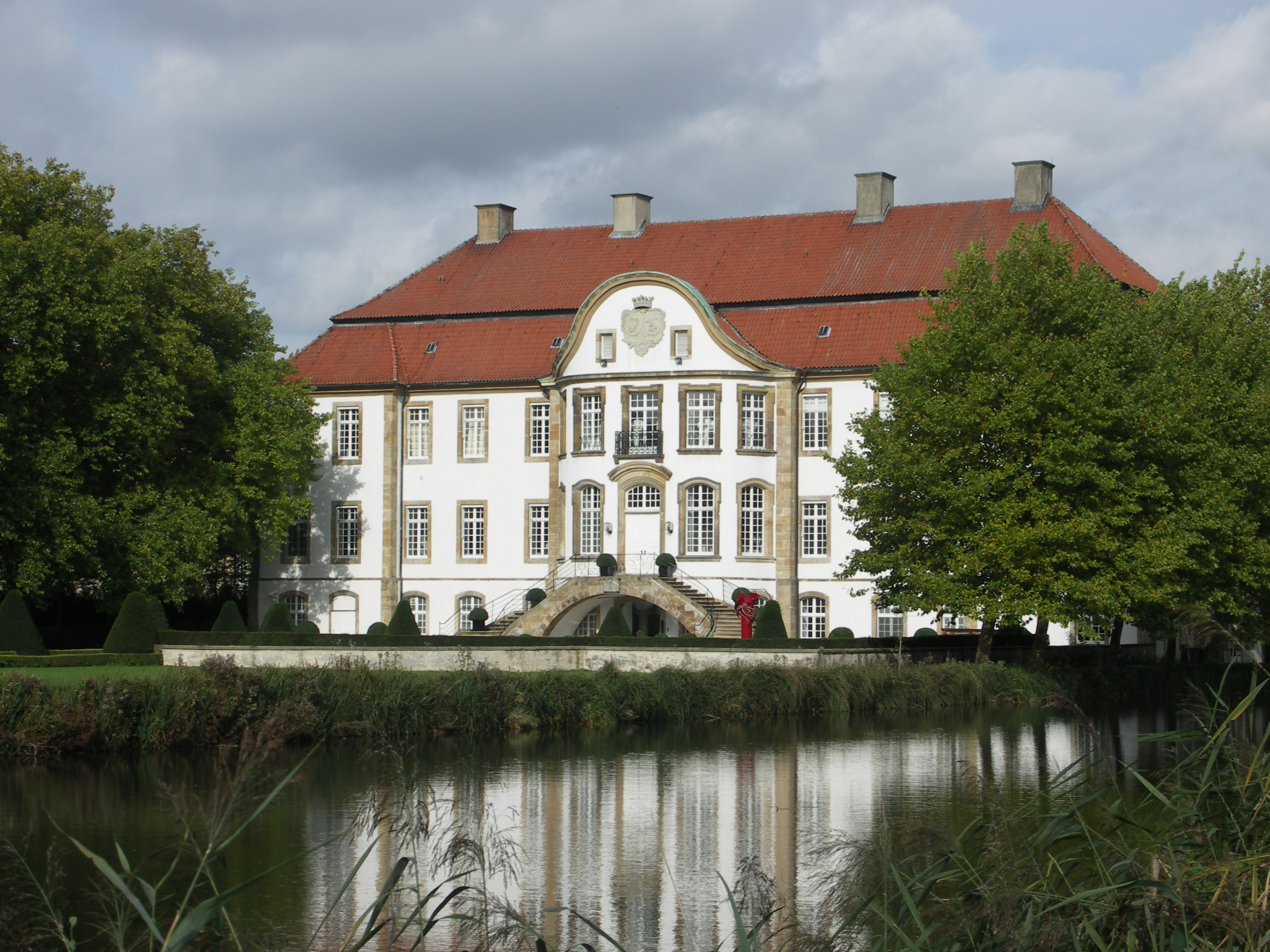 Schloß Harkotten near Sassenberg, Germany